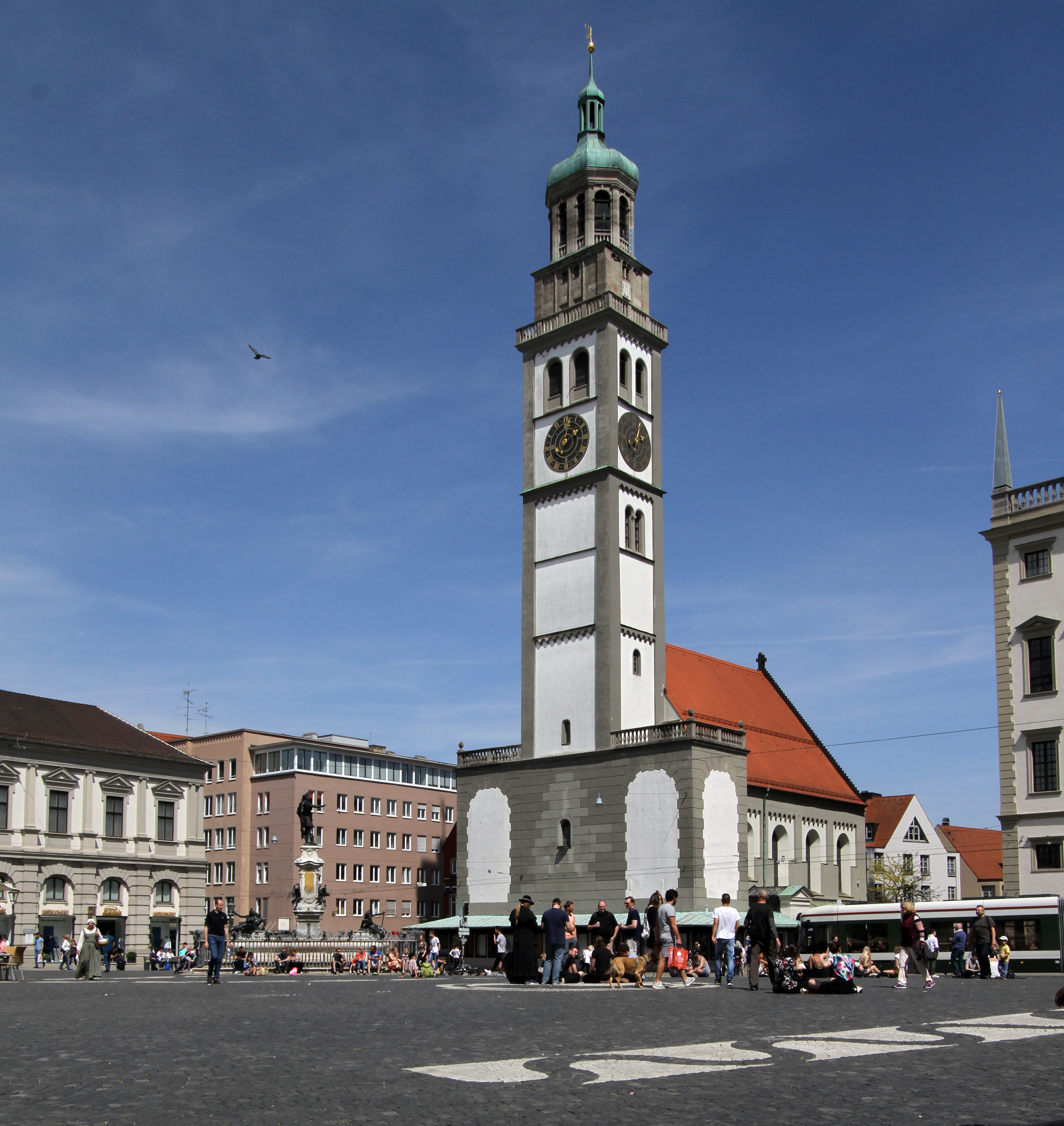 Perlachturm. Achtgeschossiger Bau über querrechteckigem Grundriss, oktogonaler Aufsatz mit Zwiebelhaube und Laterne, Unterbau mit flankierenden Altanen, der Kern des Unterteils noch hochmittelalterlich, 1526/27 erhöht, die oberen Geschosse 1614/16 von Elias Holl, nach Beschädigung 1944 wiederhergestellt.